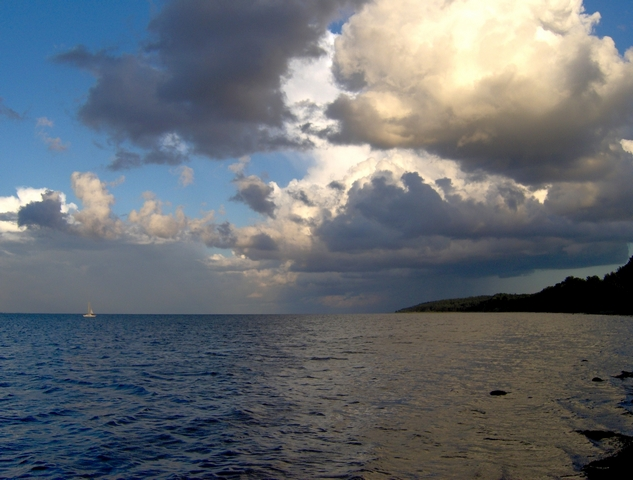 Zatoka Pucka, pomiędzy Puckiem a Rzucewem, wojewodztwo pomorskie, lato 2006 Bay of Puck, Pomorskie voivodeship, Poland, Baltic Sea, summer of 2006 Autor: Krzysztof